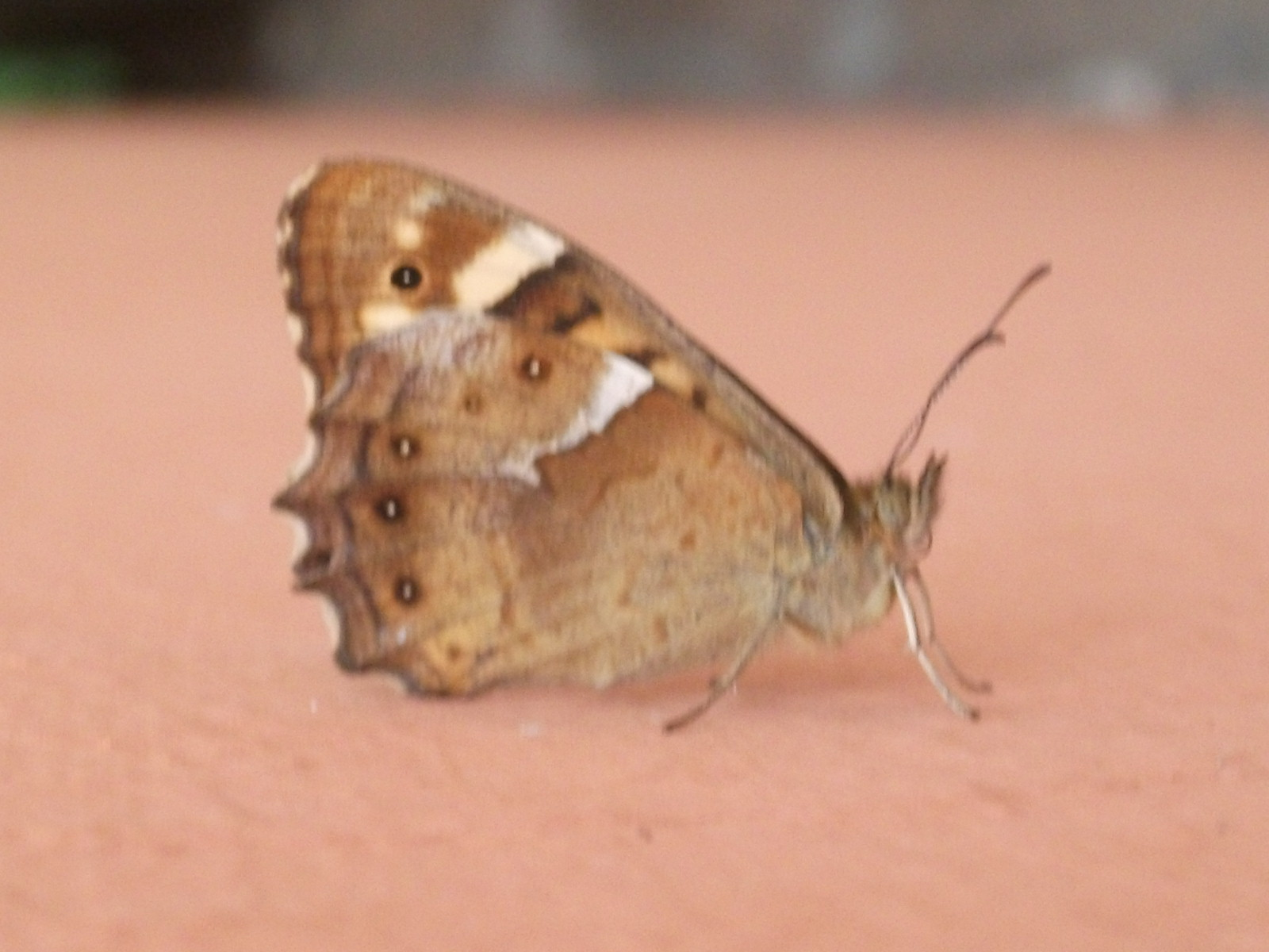 Tomada en Tegueste, Tenerife.